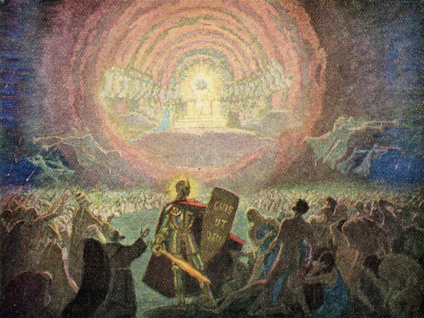 Gebhard Fugel (1863-1939): Bilder zur Apokalypse (1933) Mit der Apokalypse hat sich Fugel immer wieder beschäftigt. Zwischen 1917 und 1933 schuf er Freskenentwürfe zur Apokalypse, die sich jetzt im Besitz des Klosters Scheyern befinden. Die hier gezeigten 25 Entwürfe zur Apokalypse stammen aus dem Jahr 1933. Sie sind einer Textausgabe der Apokalypse beigefügt und illustrieren die Apokalypse in einer textnahen und erzählerischen Weise. Quelle: Die Apokalypse oder die Offenbarung des hl. Johannes, übersetzt und erklät von Dr. Jakob Schäfer, päpstlicher Hausprälat, … mit Bildern von Prof. Gebhard Fugel, München, 1933, Verlag: Volksliturgisches Apostolat Klosterneuenburg.